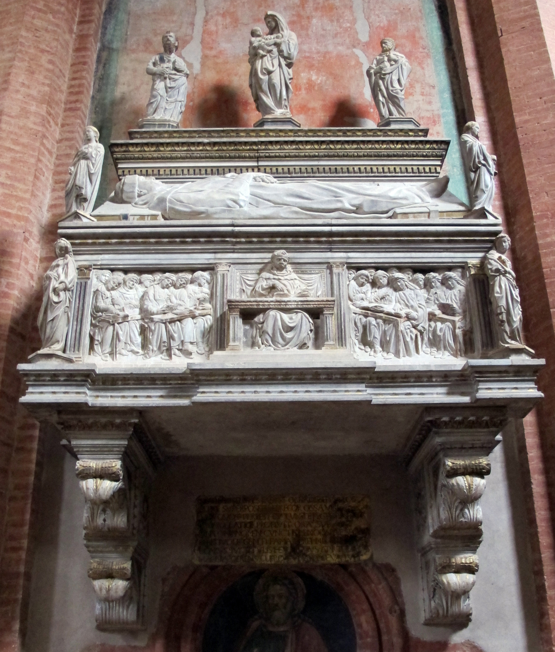 San Giacomo Maggiore (Bologna)